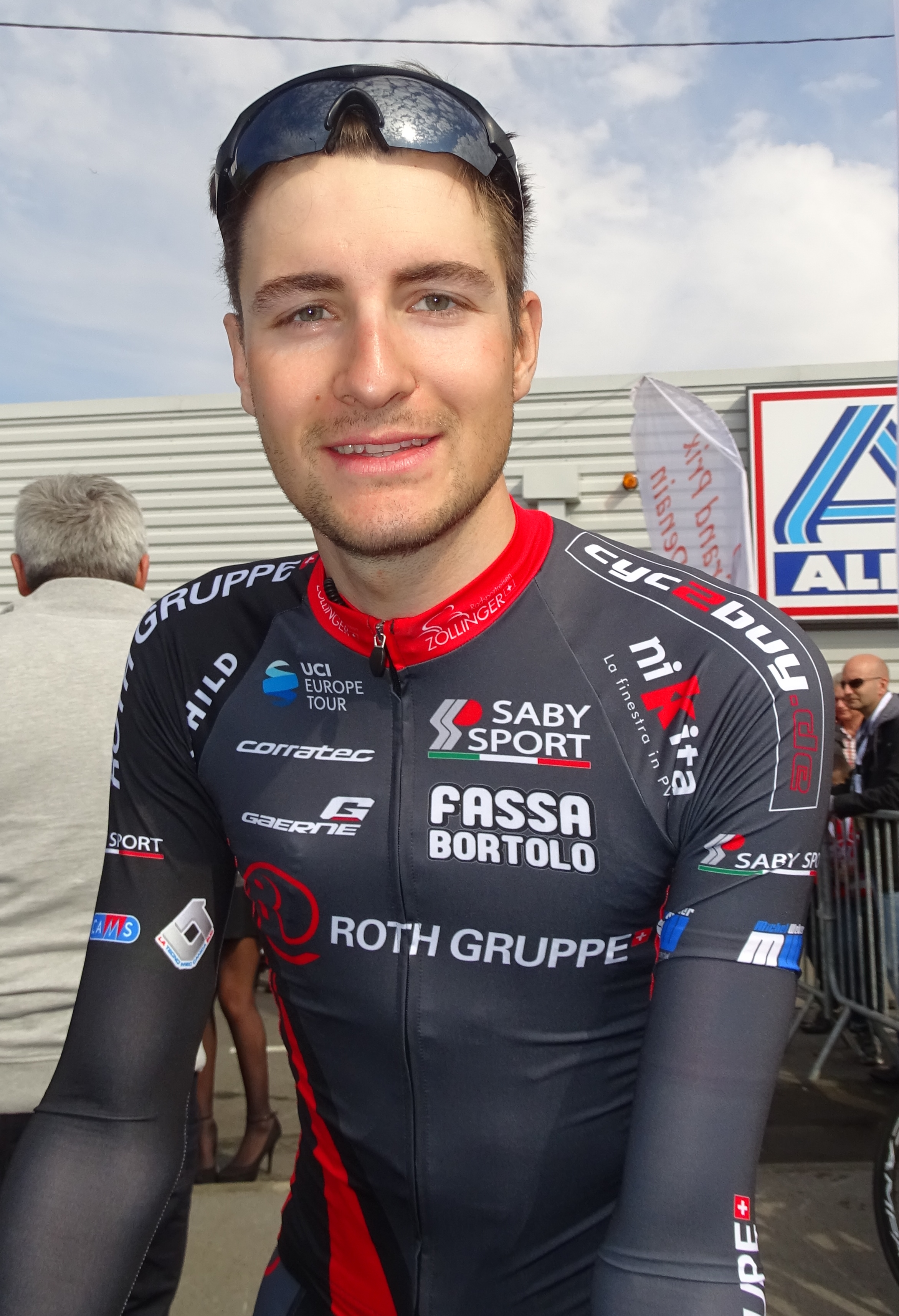 Reportage réalisé le jeudi 14 avril à l'occasion du départ et de l'arrivée du Grand Prix de Denain 2016 à Denain, Nord, Nord-Pas-de-Calais-Picardie, France.